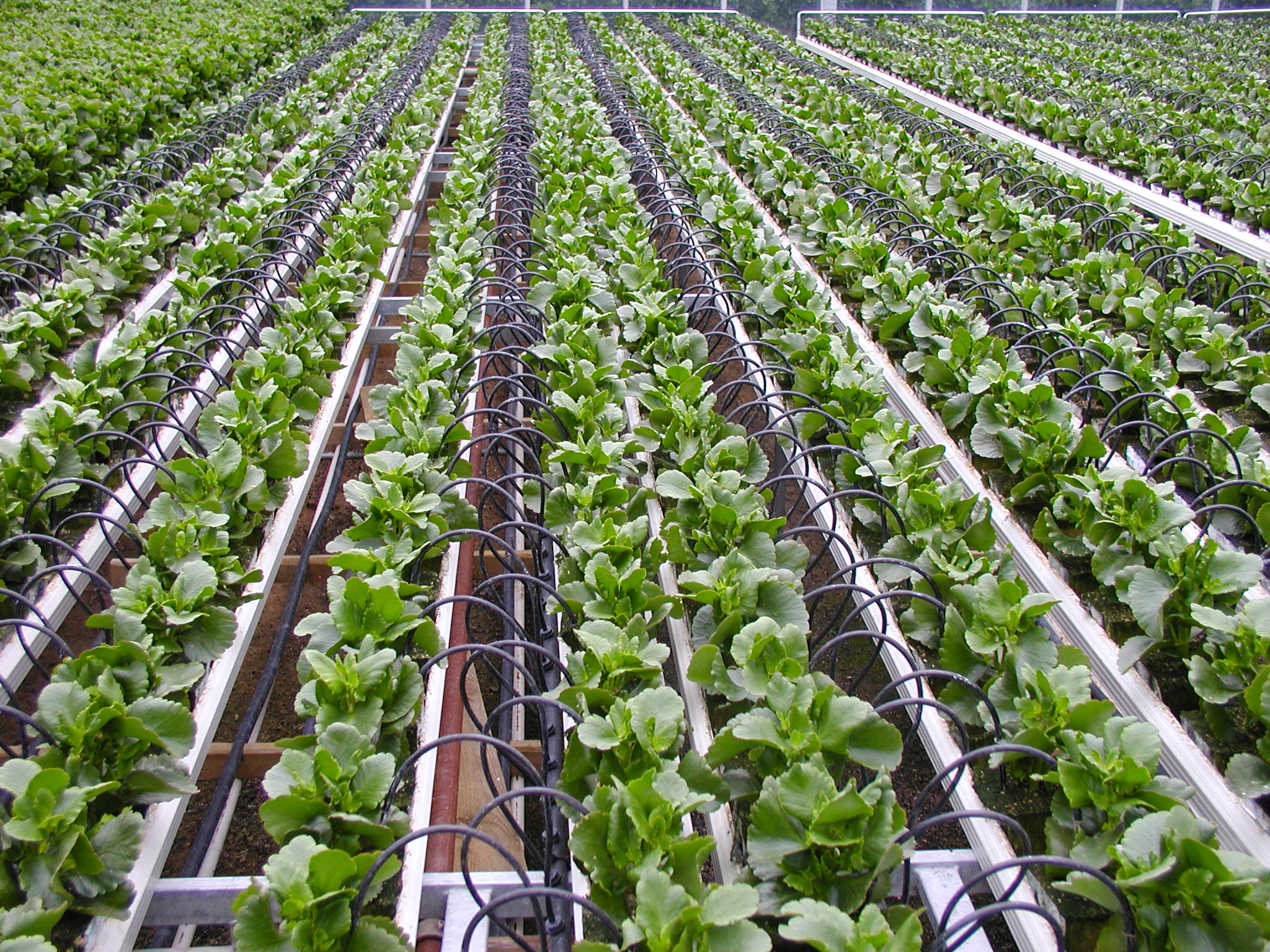 טפטפת ננעצת לא מווסתת